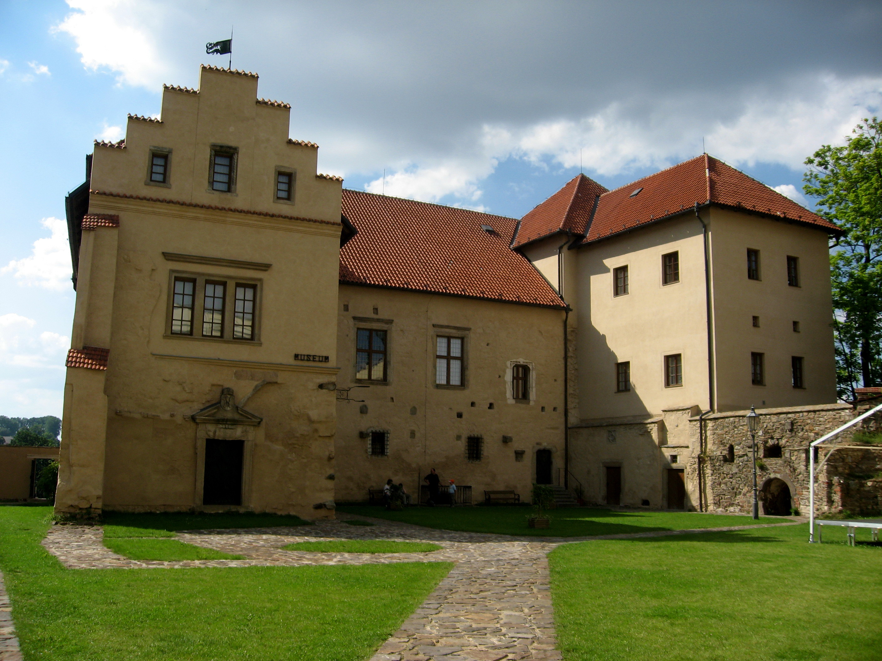 Polná, vnitřní areál zámku